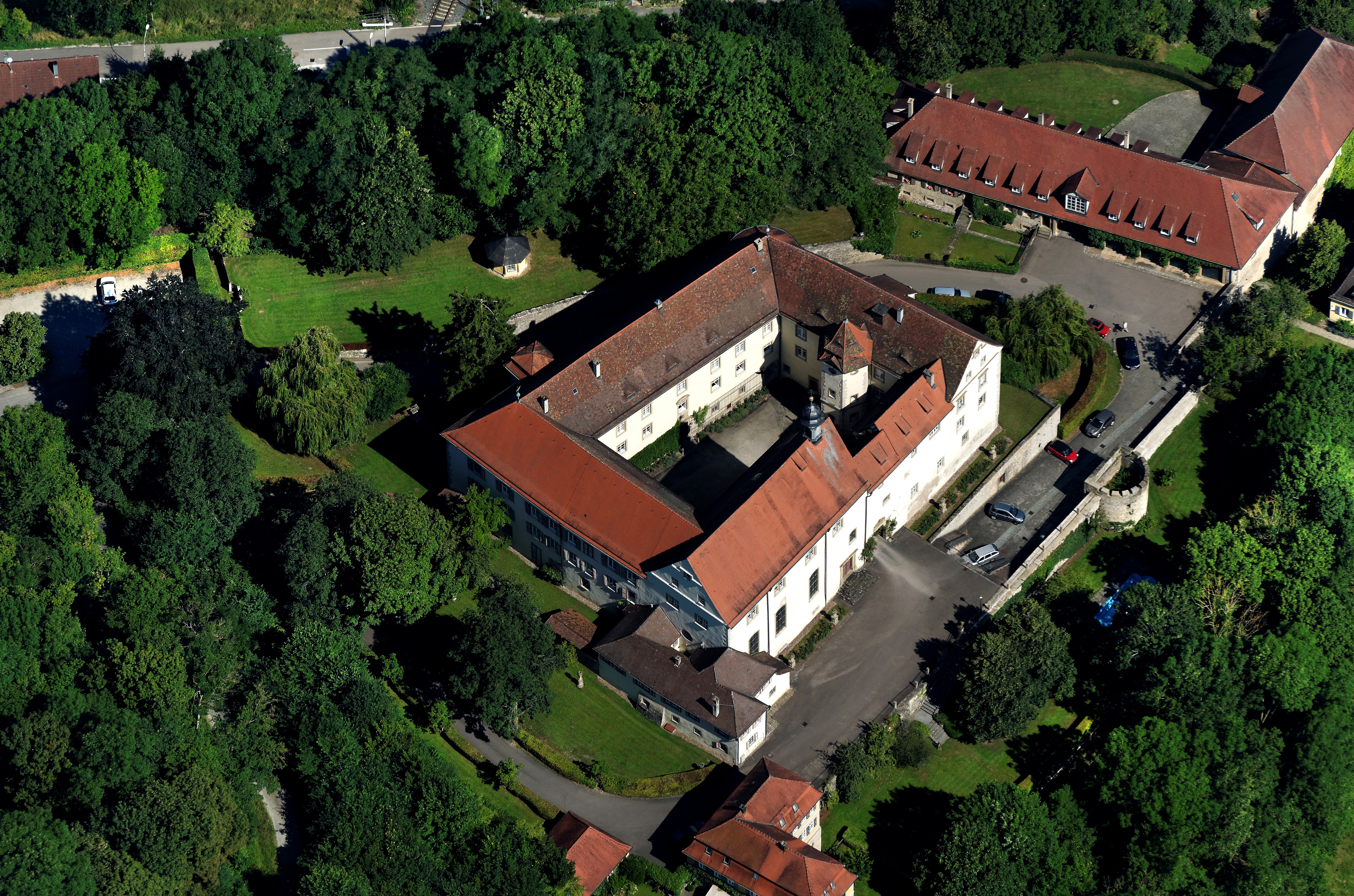 Niederstetten aus dem Flugzeug gesehen.